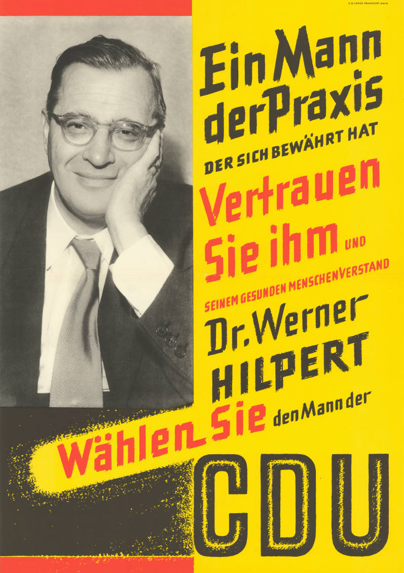 Ein Mann der Praxis der sich bewährt hat Vertrauen Sie ihm und seinem gesunden Menschenverstand Dr. Werner Hilpert Wählen Sie den Mann der CDU Abbildung: Foto Kommentar: Datierung unsicher, evtl. zur LTW 1950? Plakatart: Kandidaten-/Personenplakat mit Porträt Drucker_Druckart_Druckort: K.G. Lohse, Frankfurt-Main Objekt-Signatur: 10-007 : 1 Bestand: Landtagswahlplakate Hessen (10-007) GliederungBestand10-18: Landtagswahlplakate Hessen (10-007) » CDU Lizenz: KAS/ACDP 10-007 : 1 CC-BY-SA 3.0 DE